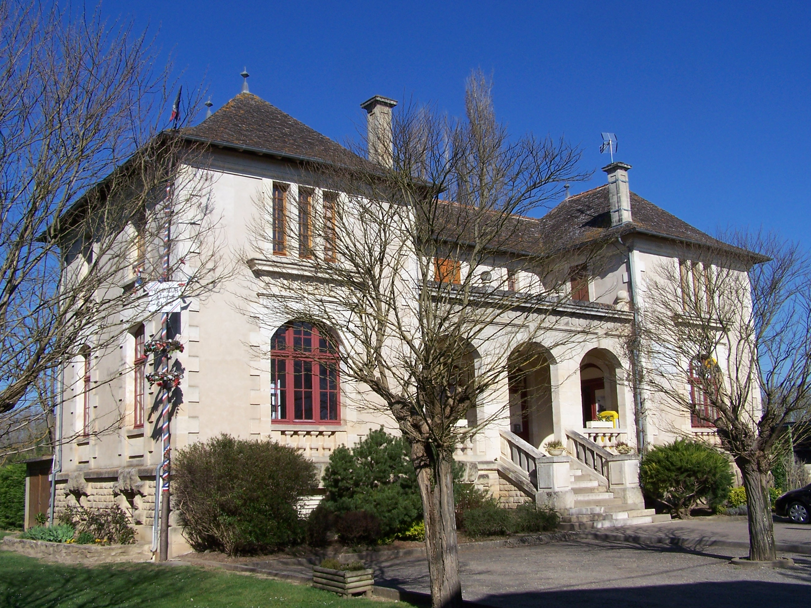 Mairie de Barie, Gironde, France